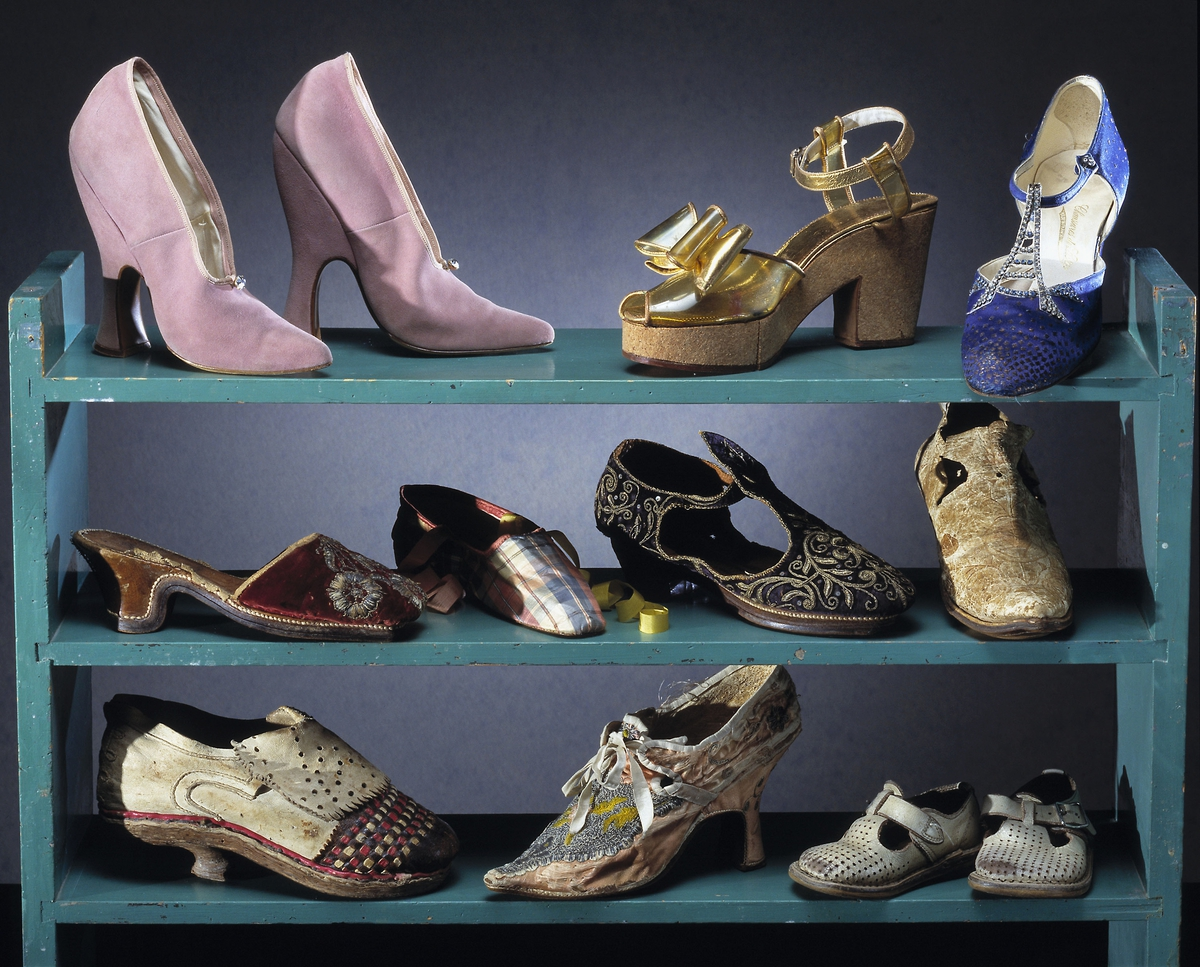 Skor från 1700- till 1960-talet. Översta hyllan från vänster 1910-1940. Mittenhyllan 1600-1850. Understa hyllan, 1700-1960-tal.